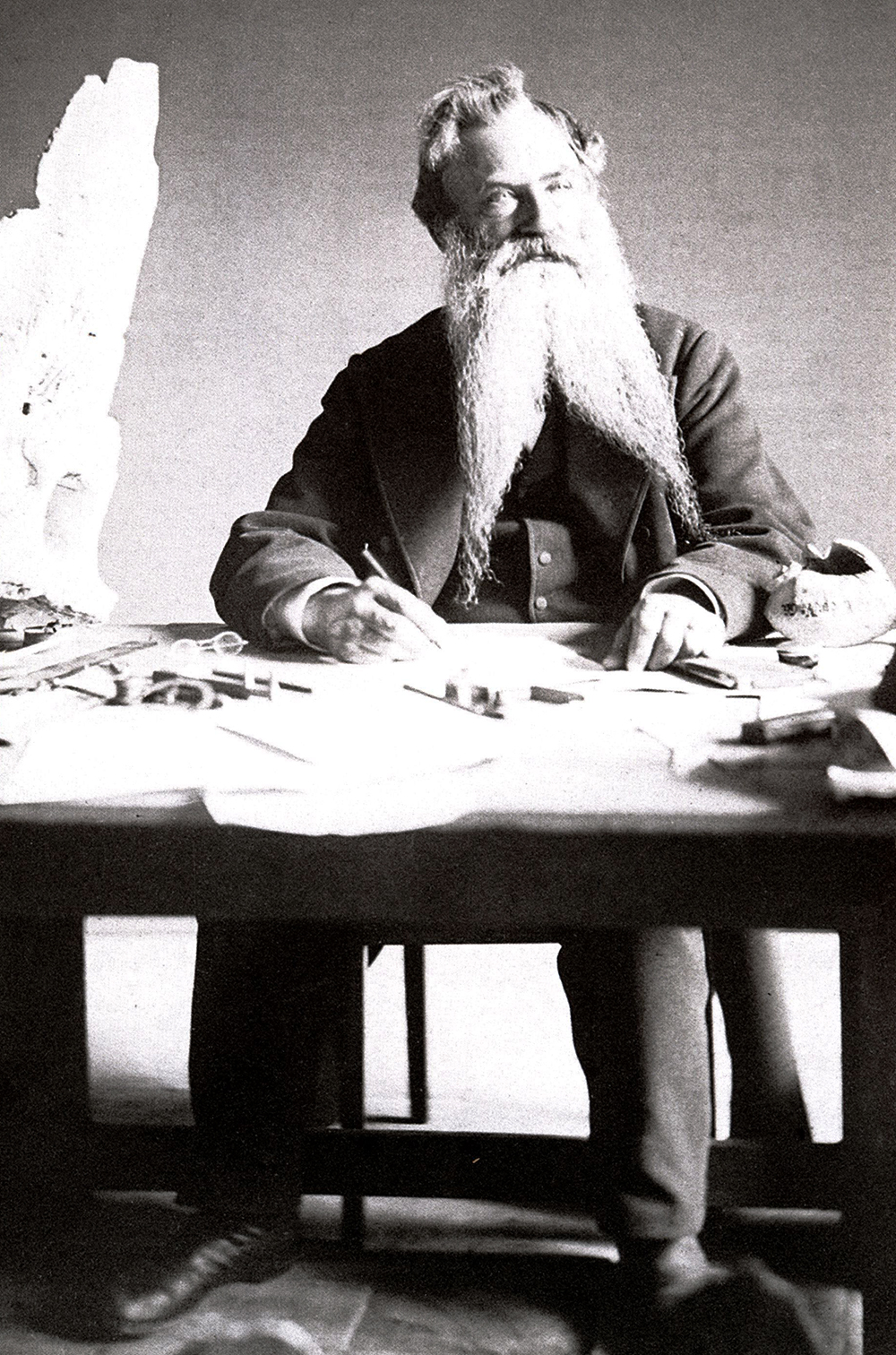 August Wilhelm Malm (1821-1882)